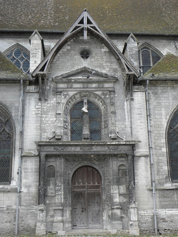 Portail nord de l'église Saint-Nizier de Troyes (10). .